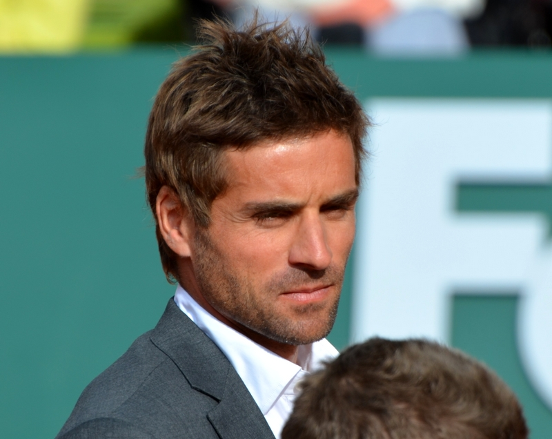 Arnaud Clément en 2014 à Roland Garros à la fin du match Llodra-Verdasco.